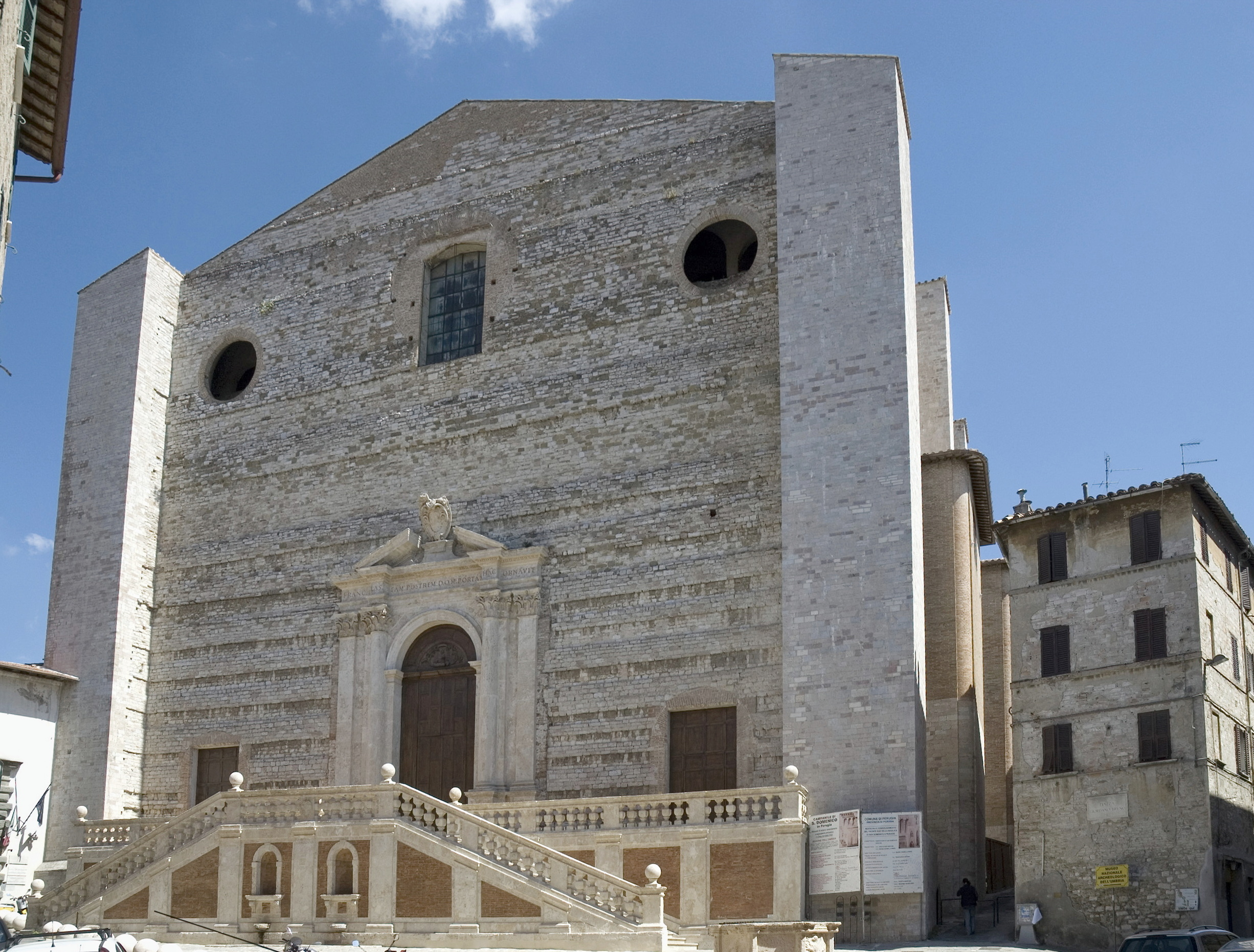 Basilica di San Domenico, Perugia.